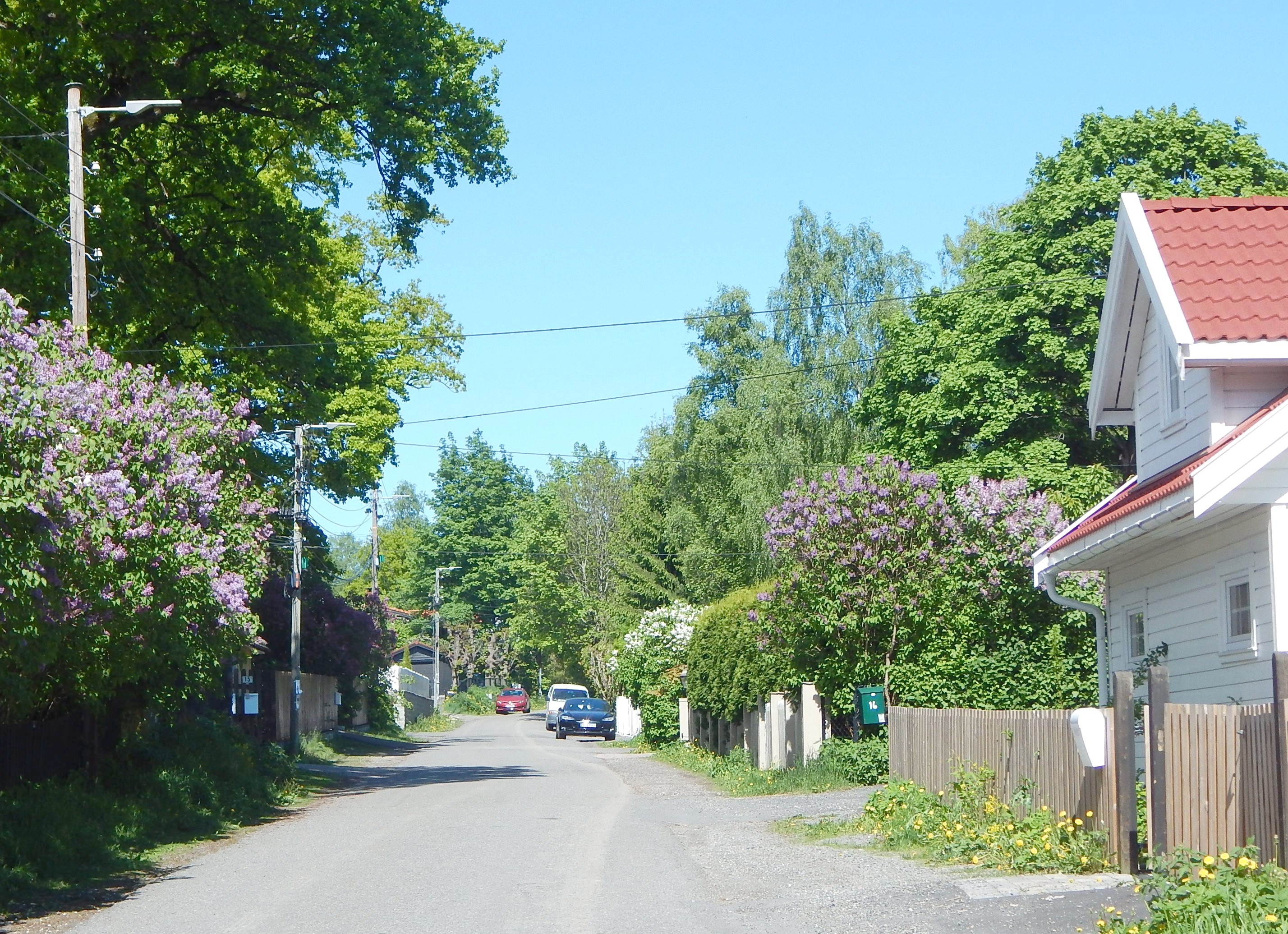 Charlotte Andersens vei